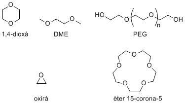 segona fig. d'èters. 16/10/06